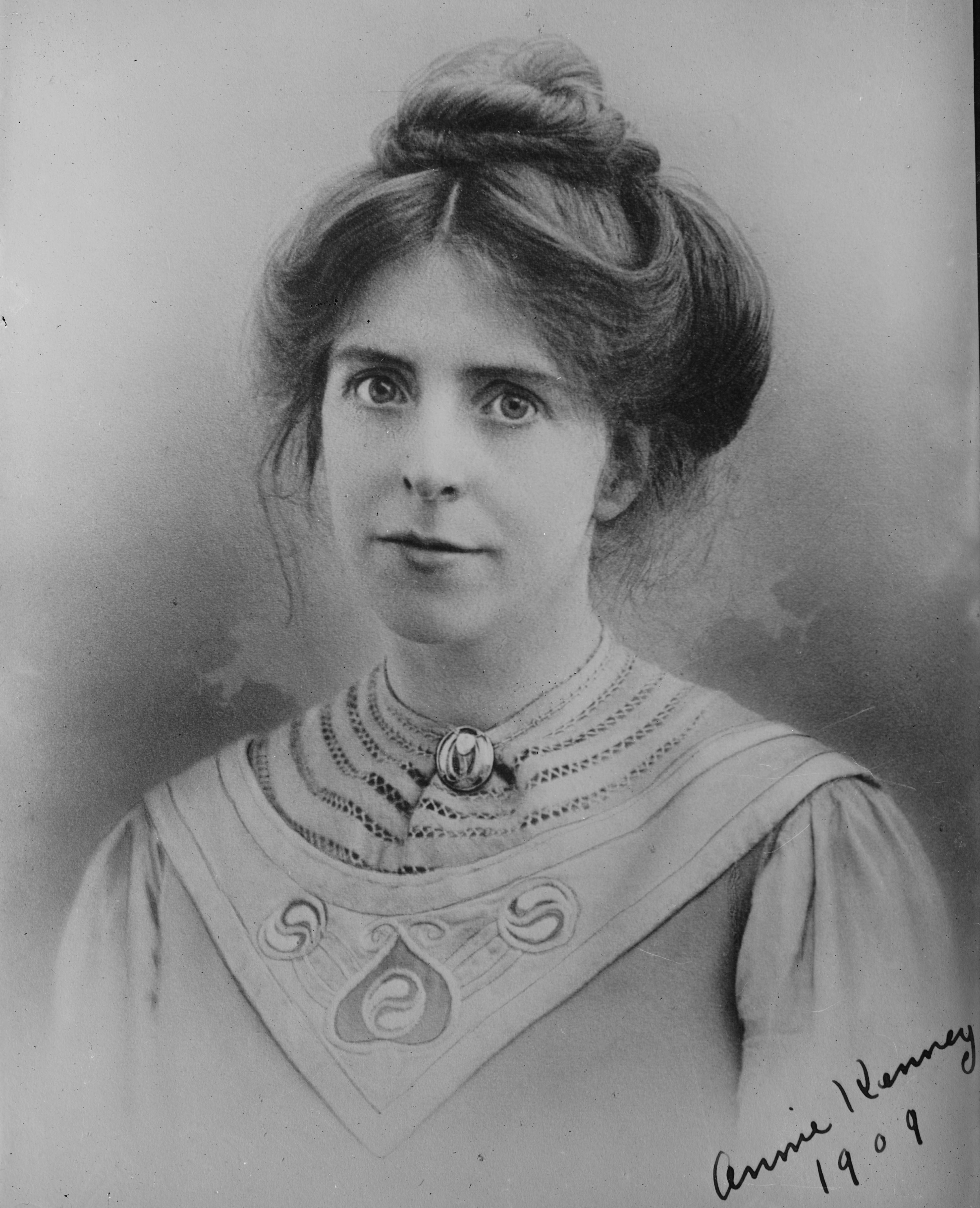 Annie Kenney (1879–1953), British suffragette.